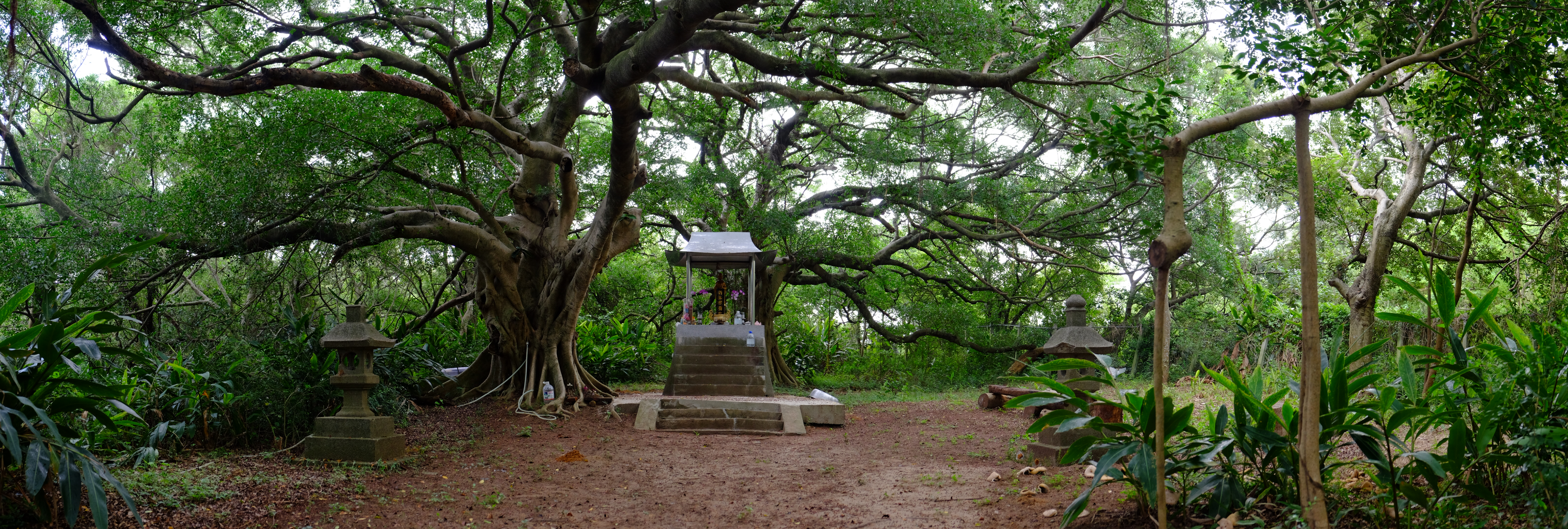 2016年苗栗縣竹南鎮崎頂神社